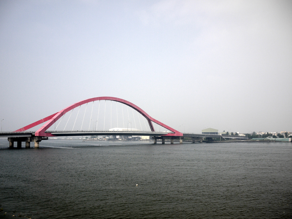 東港鎮進德大橋。